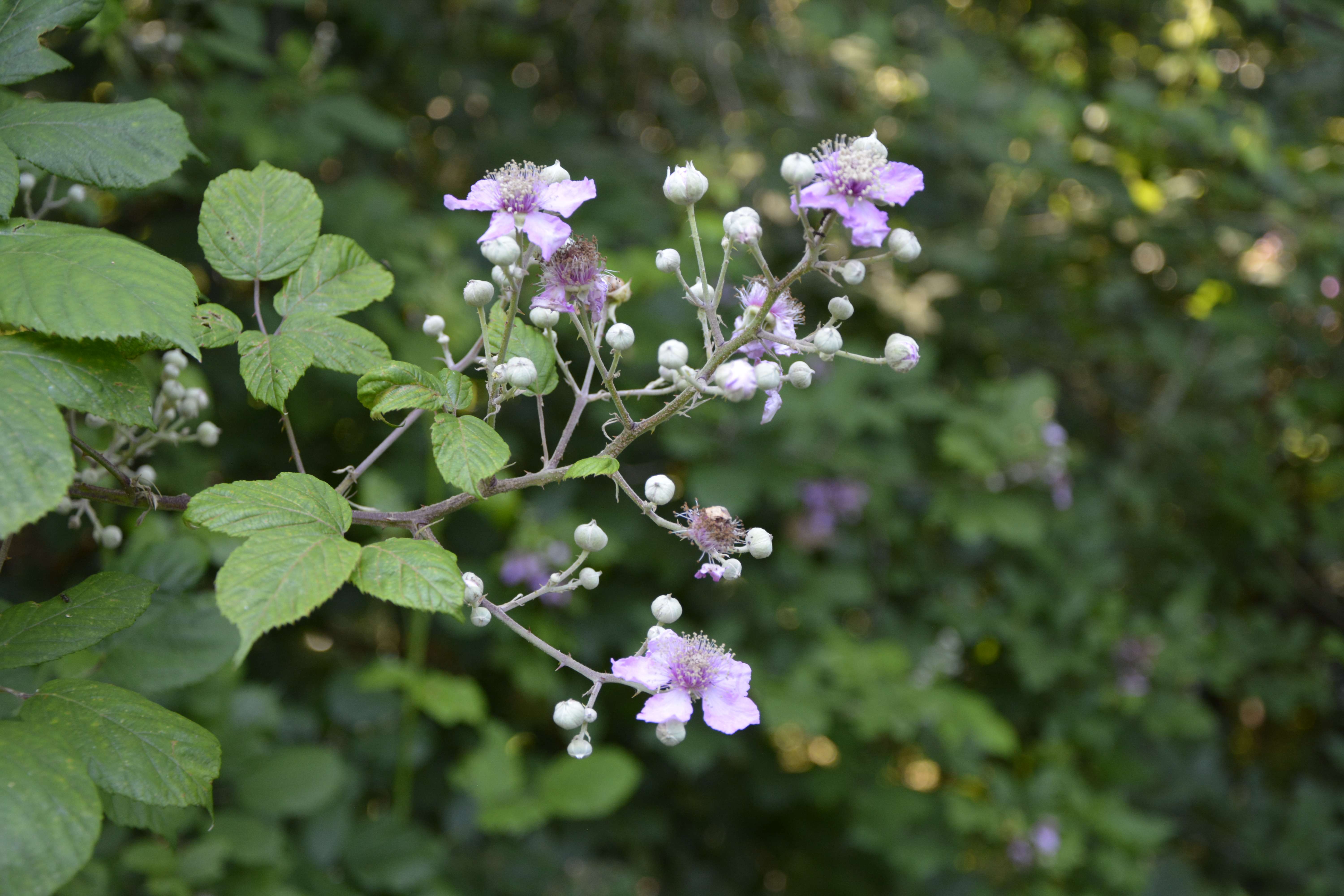 L'Ansa di Castelnovate (Q55581281), sito di interesse comunitario sulla sponda lombarda del fiume Ticino, nel comune di Vizzola Ticino